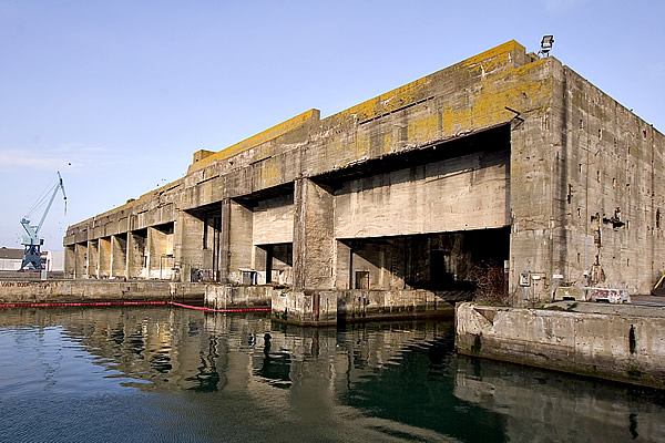 Base sous marine (WWII) du port de La Pallice vue Sud-Ouest. Pep.per de Ré Photo issue de ma banque d'images